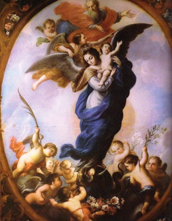 Virgen del Apocalipsis